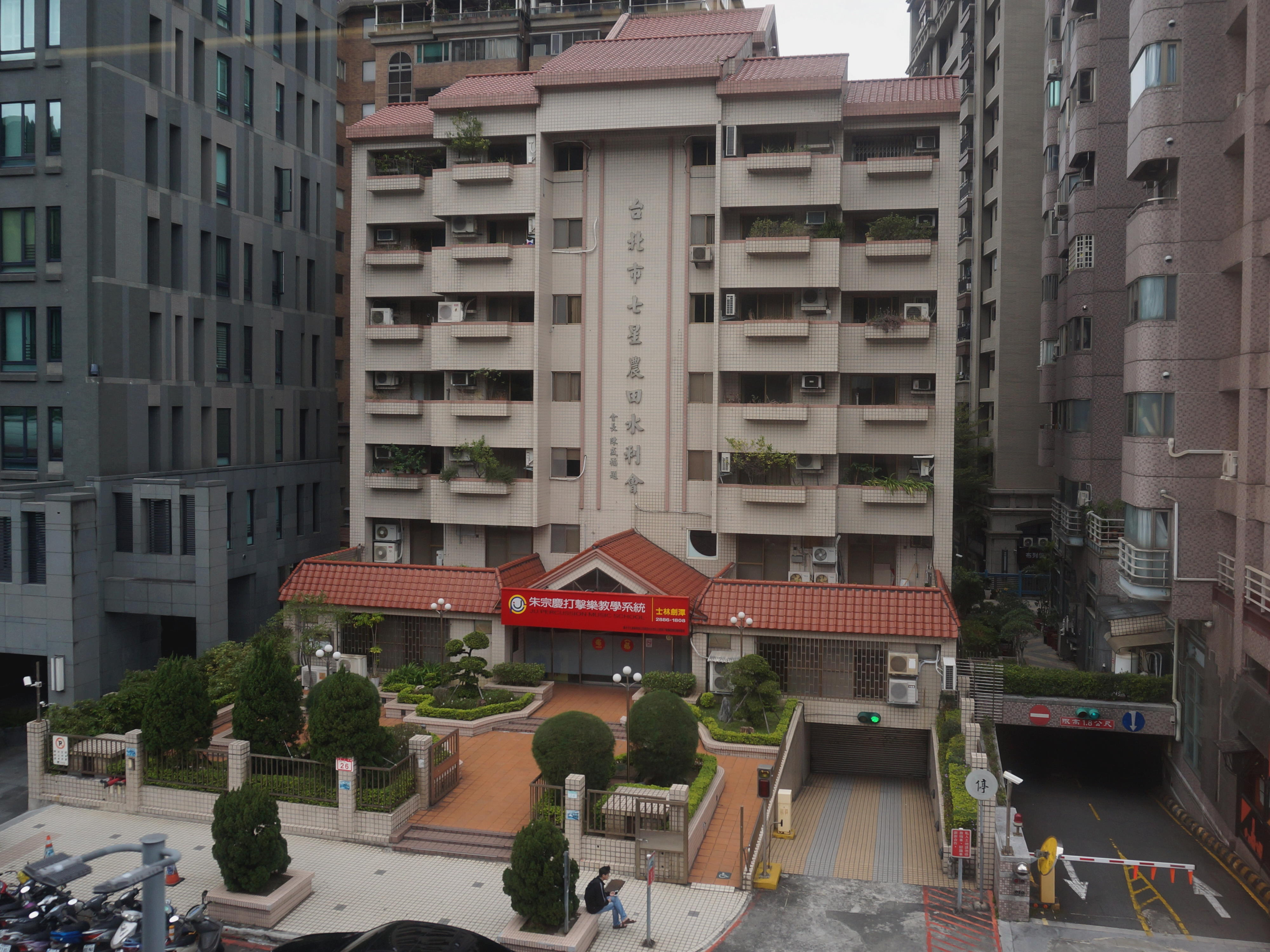 臺北市七星農田水利會大樓，地址：臺北市士林區基河路26、28號。於臺北捷運劍潭站往臺北車站方向列車上拍攝。